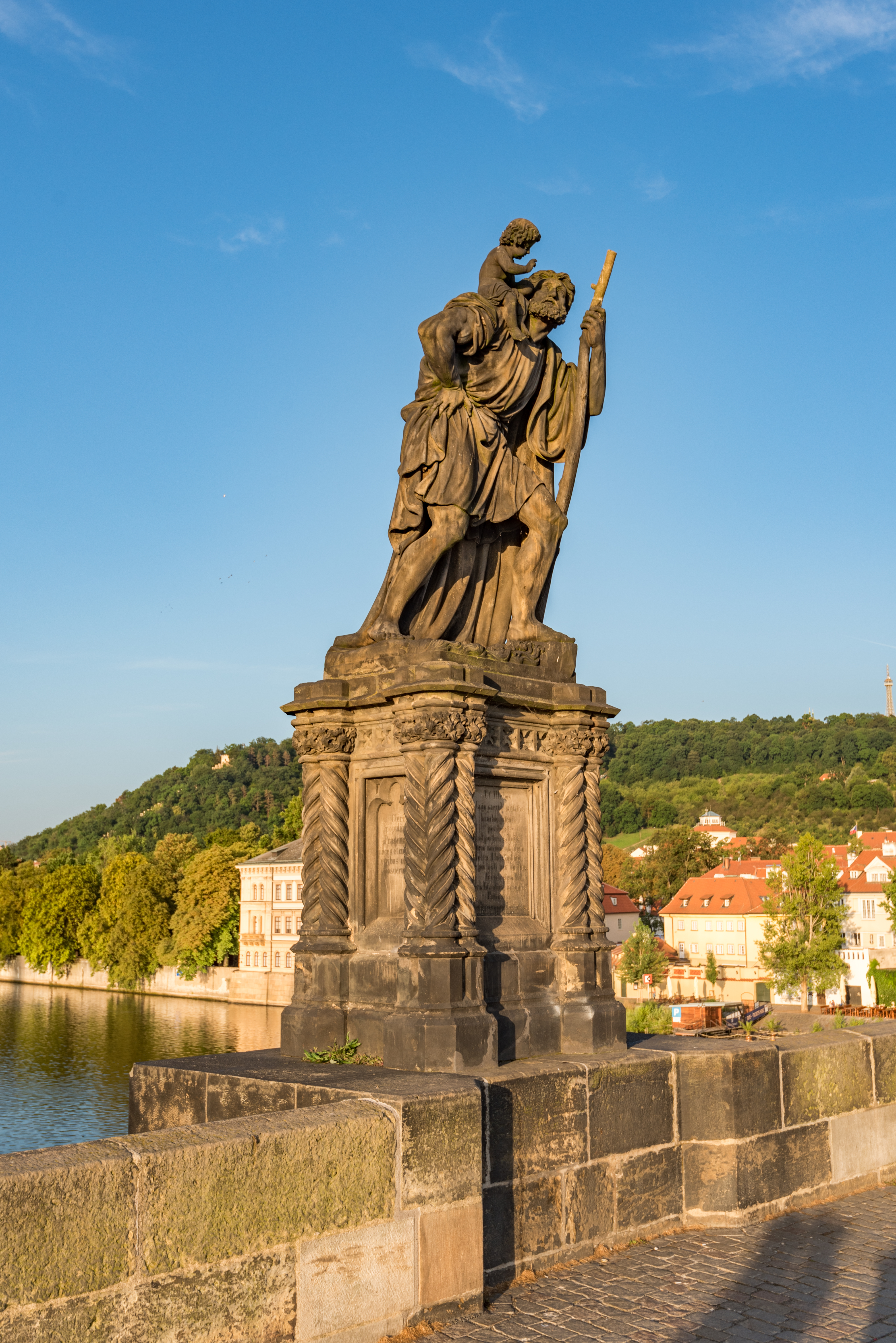 Praha 1, Karlův most, Sochy, Sv. Kryštof